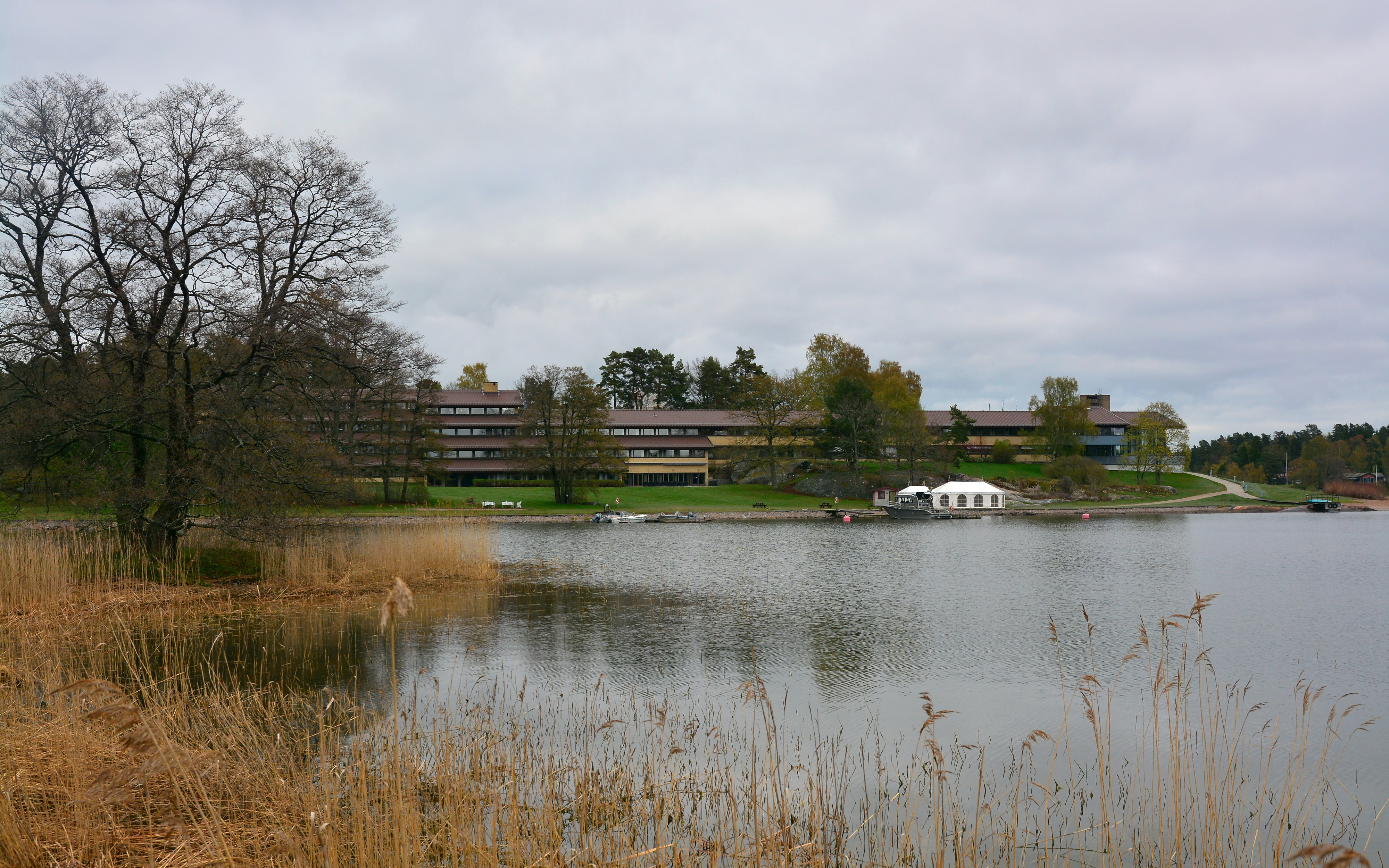 Skåvsjöholm i Österåker